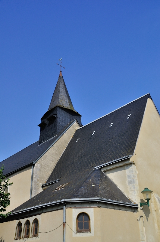 Vineuil (Indre) - Eglise Saint-Vincent